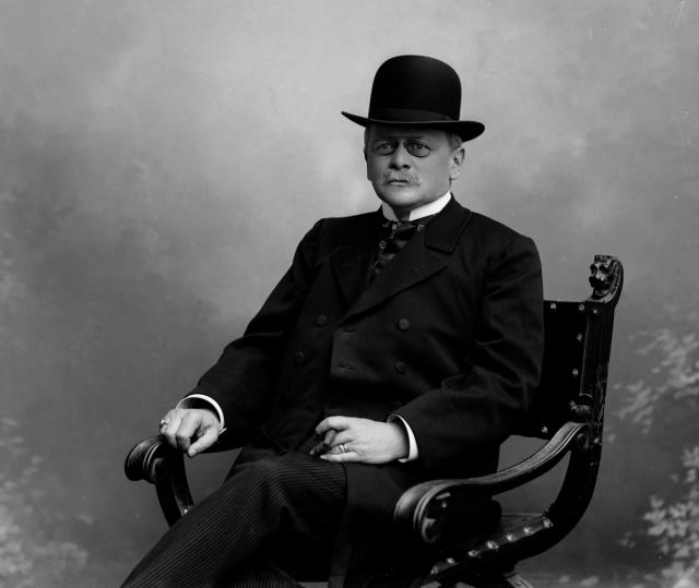 Alois Kotrbelec (1849 - 1918), Český a rakouský advokát a politik.